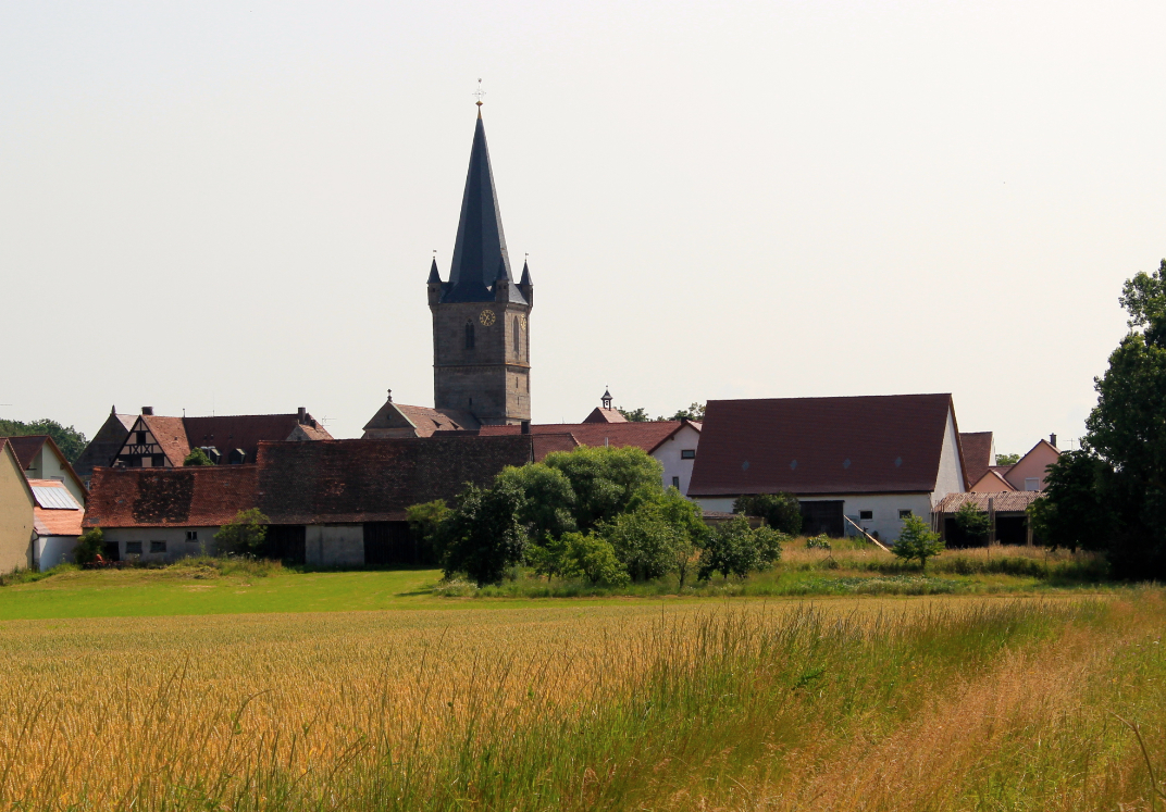 Hannberg (Gemeinde Heßdorf) mit Wehrkirche Geburt Mariens, Landkreis Erlangen-Höchstadt